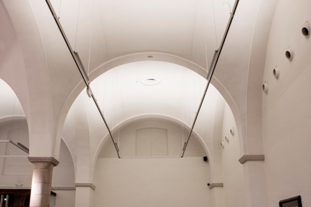 Detall Sala de les Voltes